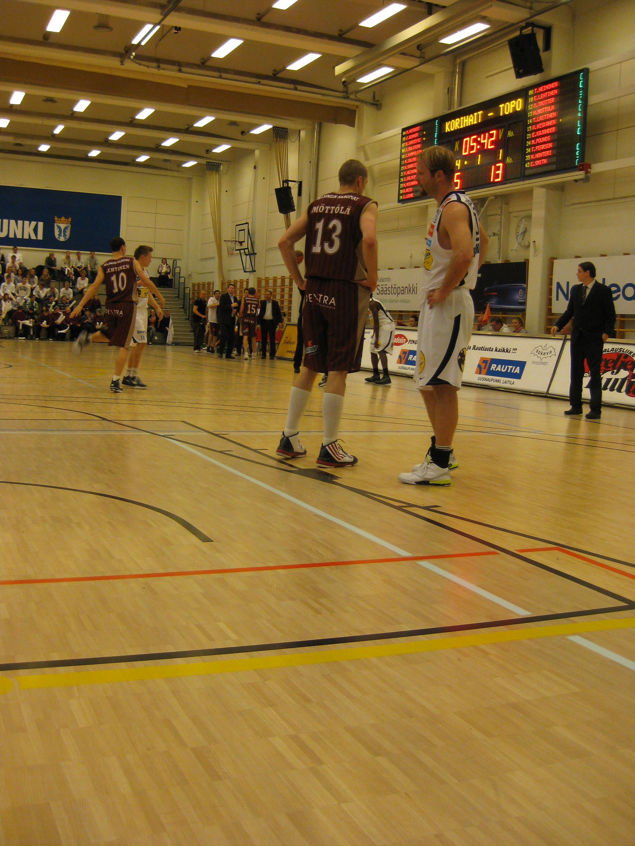 Korisliiga playoffs 2010 Korihait-Topo. 13# Hanno Möttölä, right Jussi Kumpulainen.